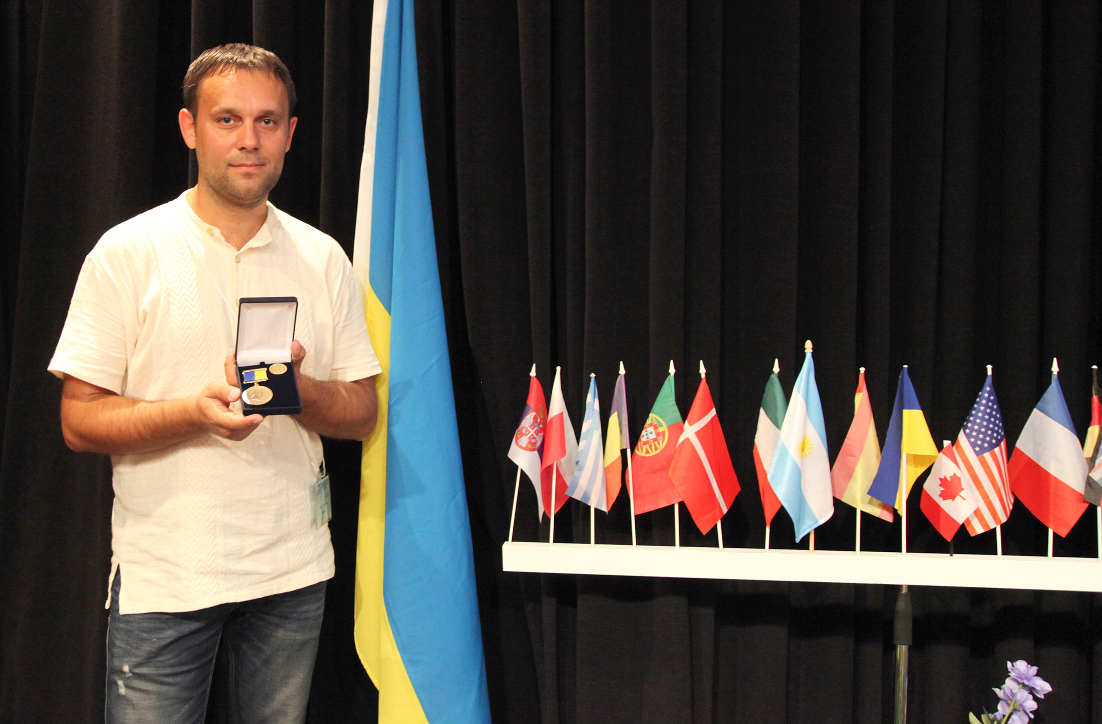 Теліпський Руслан Юрійович, нагорода від Світового конгресу українців